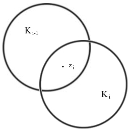 Kreiskette